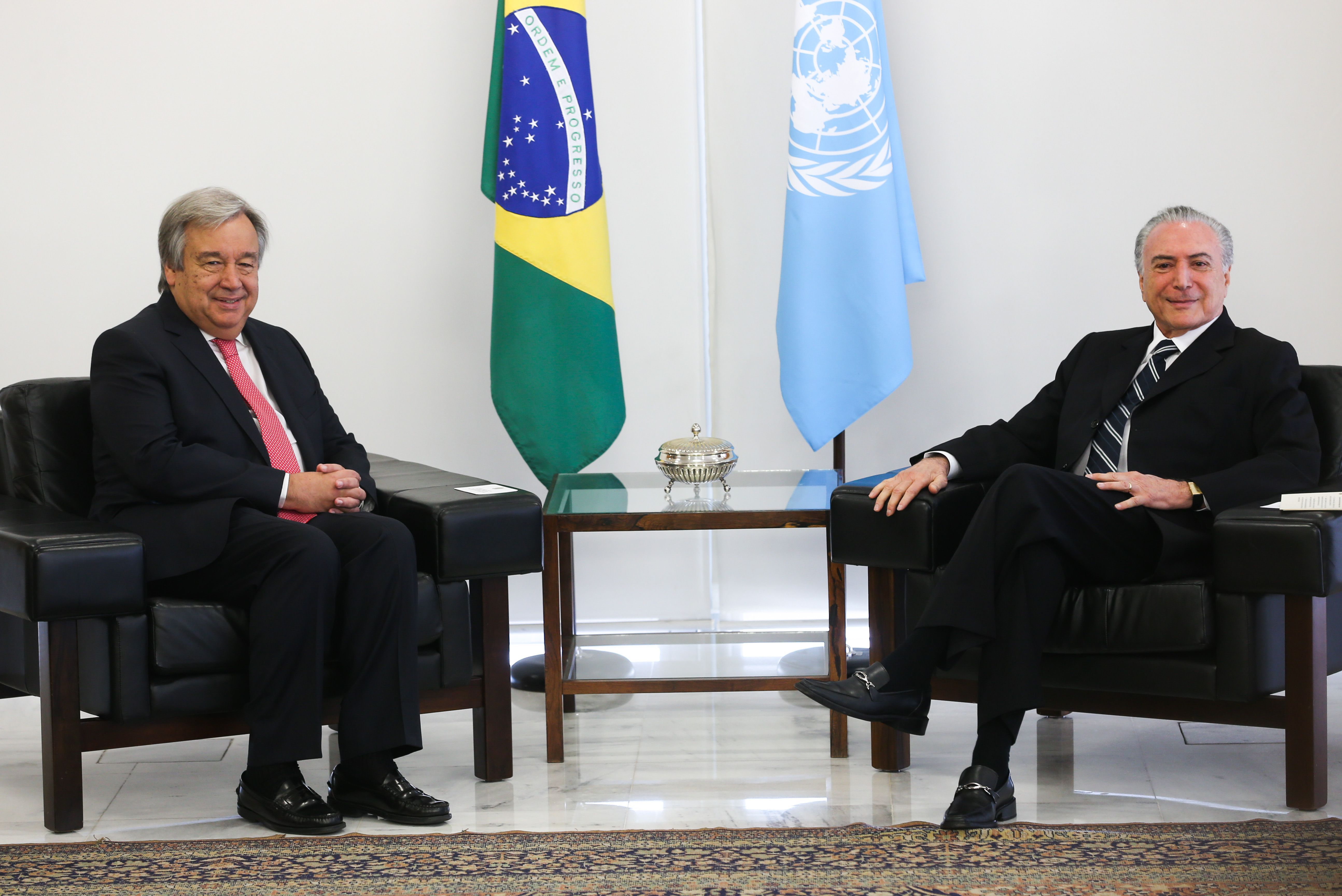 Temer recebe o secretário-geral eleito da ONU, António Guterres